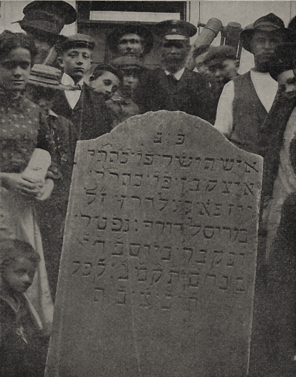 Fund eines Leichensteins aus dem Jahre 1782, Foto Julius Sohn. Artikeltext: "Der israelitische Leichenstein wurde beim Legen einer Gasleitung vor dem Hause der 'Neuesten Nachrichten' gefunden. Er wurde 1782 für Isaac Geldern, einem Großonkel Heinrich Heines mütterlicherseits gesetzt. Jetzt ist er nach dem israelitischen Friedhof überführt worden."